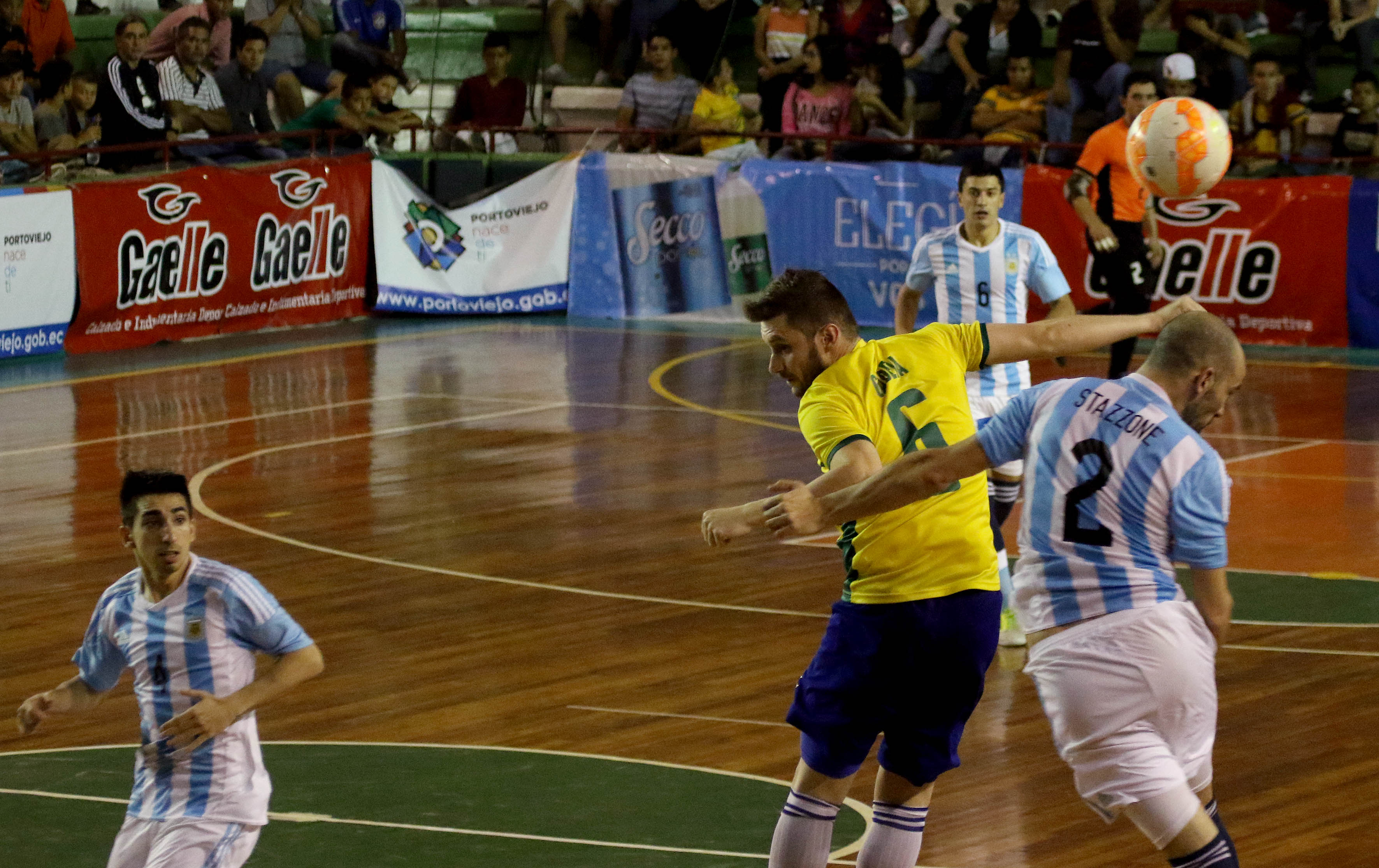 Portoviejo, Manabí, 29 de ago del 2015 (Andes).-La selección de Argentina venció en penales a Brasil y clasificó a la final de la Copa América de fútbol sala que se realíza en Portoviejo, Manabí. Foto:César Muñoz/Andes